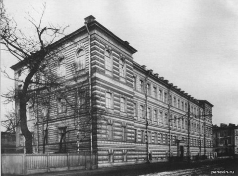 1-й ЛМИ Фото К. К. Буллы. 1913.jpg